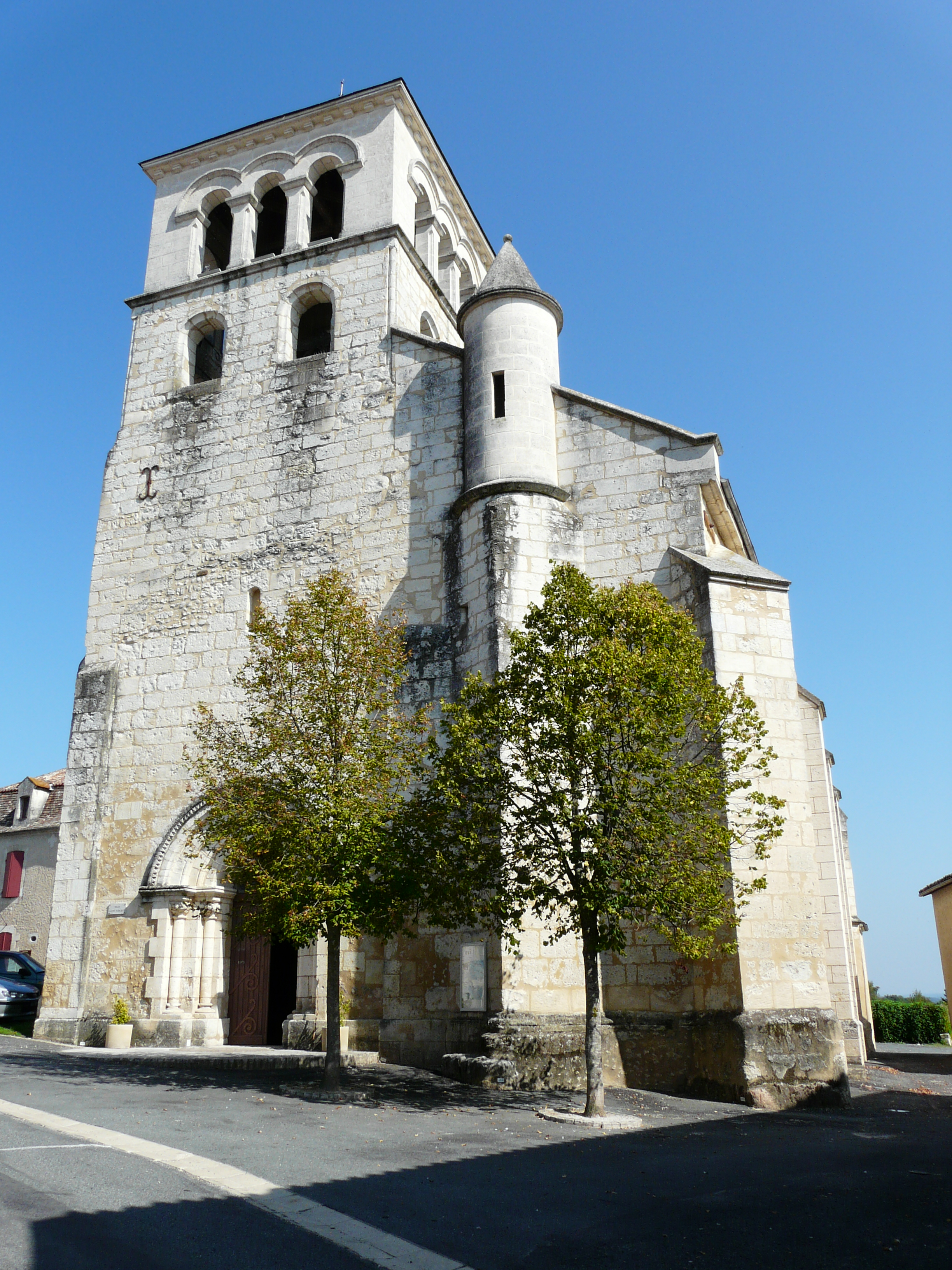 La façade ouest de l'église Saint-Vincent, Douzillac, Dordogne, France